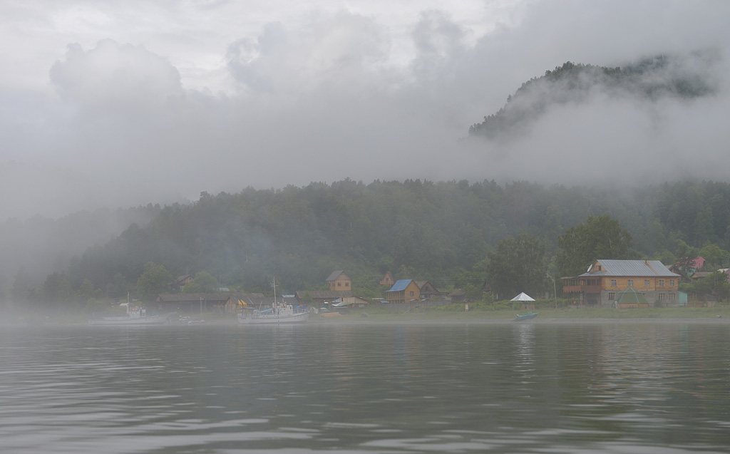 Поселок Яйлю, центральная усадьба Алтайского заповедника.